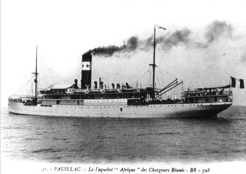 Paquebot Afrique de la compagnie Maritime des chargeurs réunis